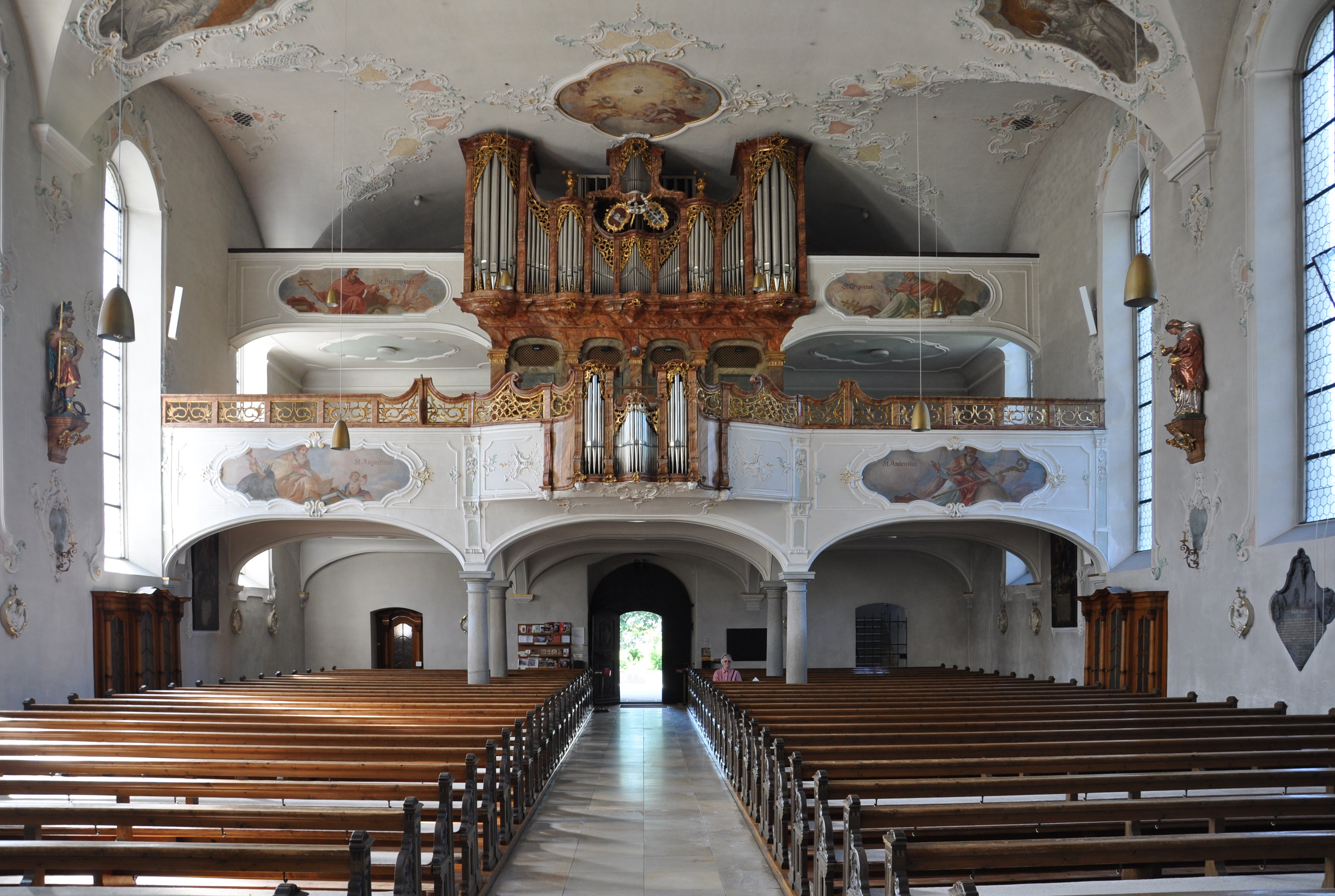 Bregenz, Pfarrkirche St. Gallus, Blick zur Orgelempore mit dem Orgelprospekt von Joseph Gabler (1771)